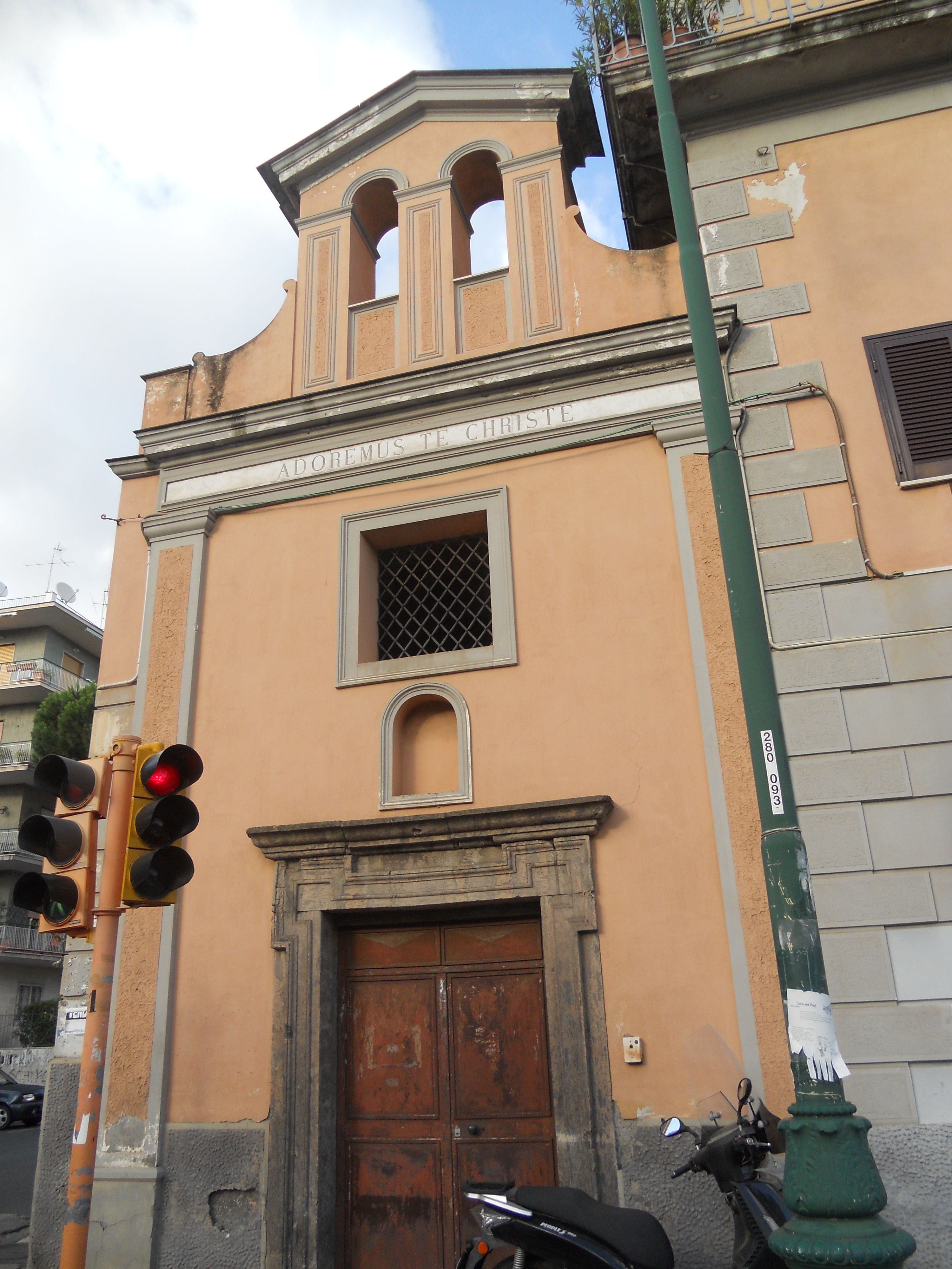 Chiesa di Santo Stefano al Vomero (Napoli)